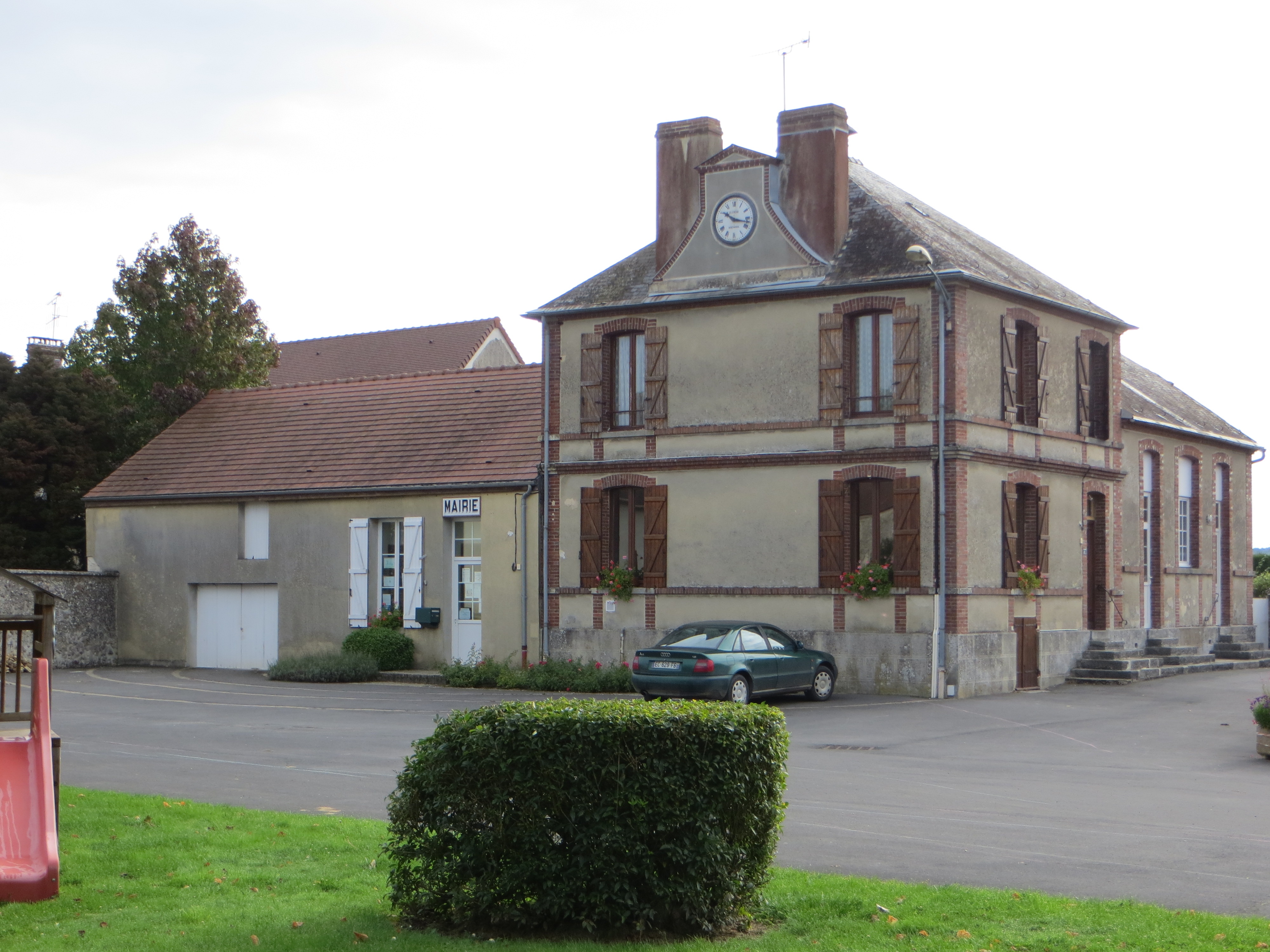 Mairie